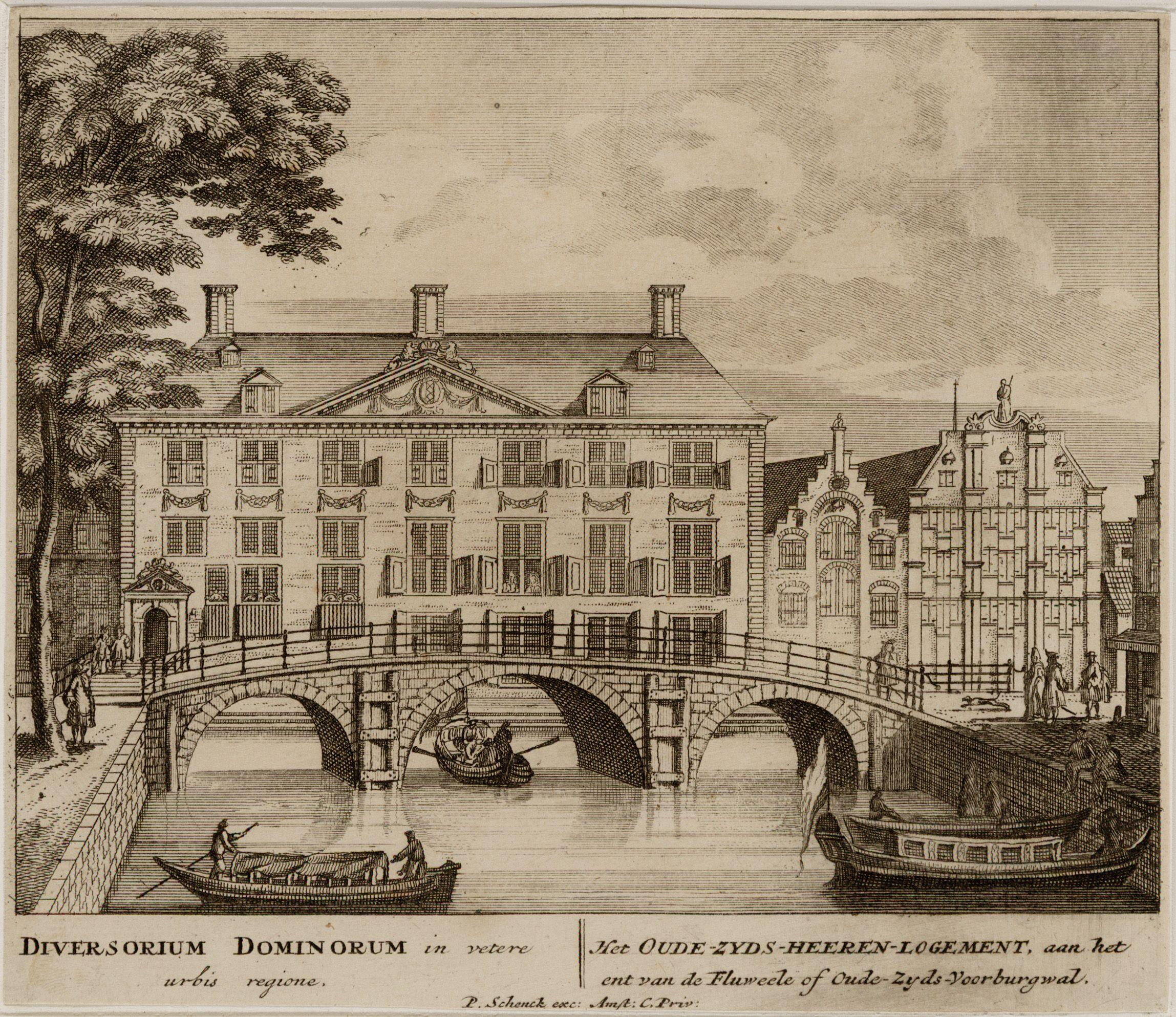 Beschrijving Het Oude Zijds-Heerenlogement, aan het ent van de Fluweele of Oude Zijds Voorburgwal Het Oude-Zijds-Heeren-Logement, Grimburgwal en rechts twee pakhuizen, waarvan de rechter het St. Pieterpakhuis genoemd word, gezien vanaf Oudezijds Voorburgwal 241. Techniek: ets. Documenttype prent Vervaardiger Schenk, Pieter (1660-1713) Collectie Collectie Stadsarchief Amsterdam: tekeningen en prenten Datering 1710 ca. Geografische naam Grimburgwal Oudezijds Voorburgwal Inventarissen Afbeeldingsbestand 010097002977